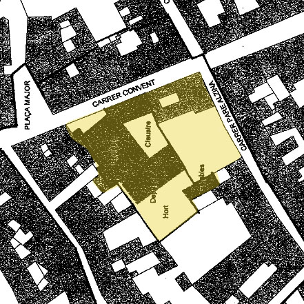 Plànol de l'esglèsia i convent de Sant Francesc de Paula assenyalats en groc, entrada pel carrer Convent.